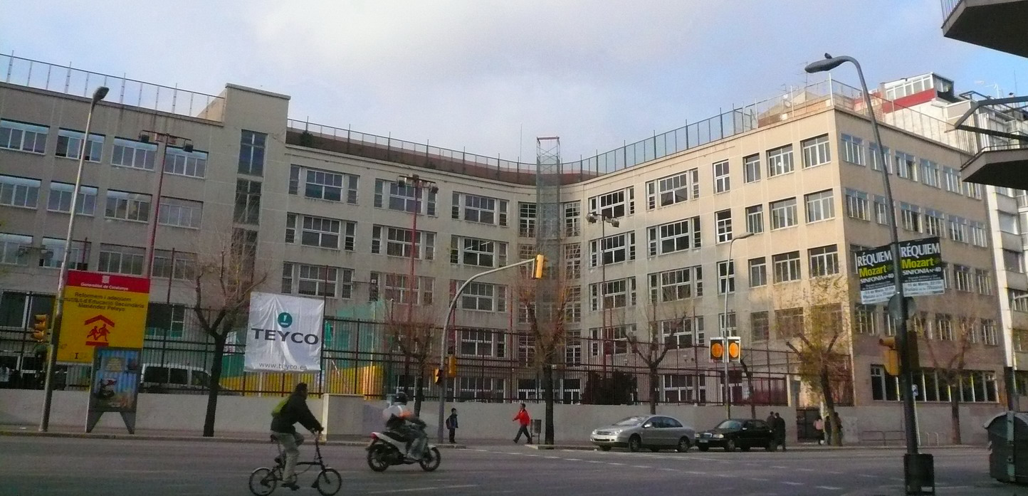 Institut Menéndez y Pelayo, antiga seu de la Mútua Escolar Blanquerna, Barcelona